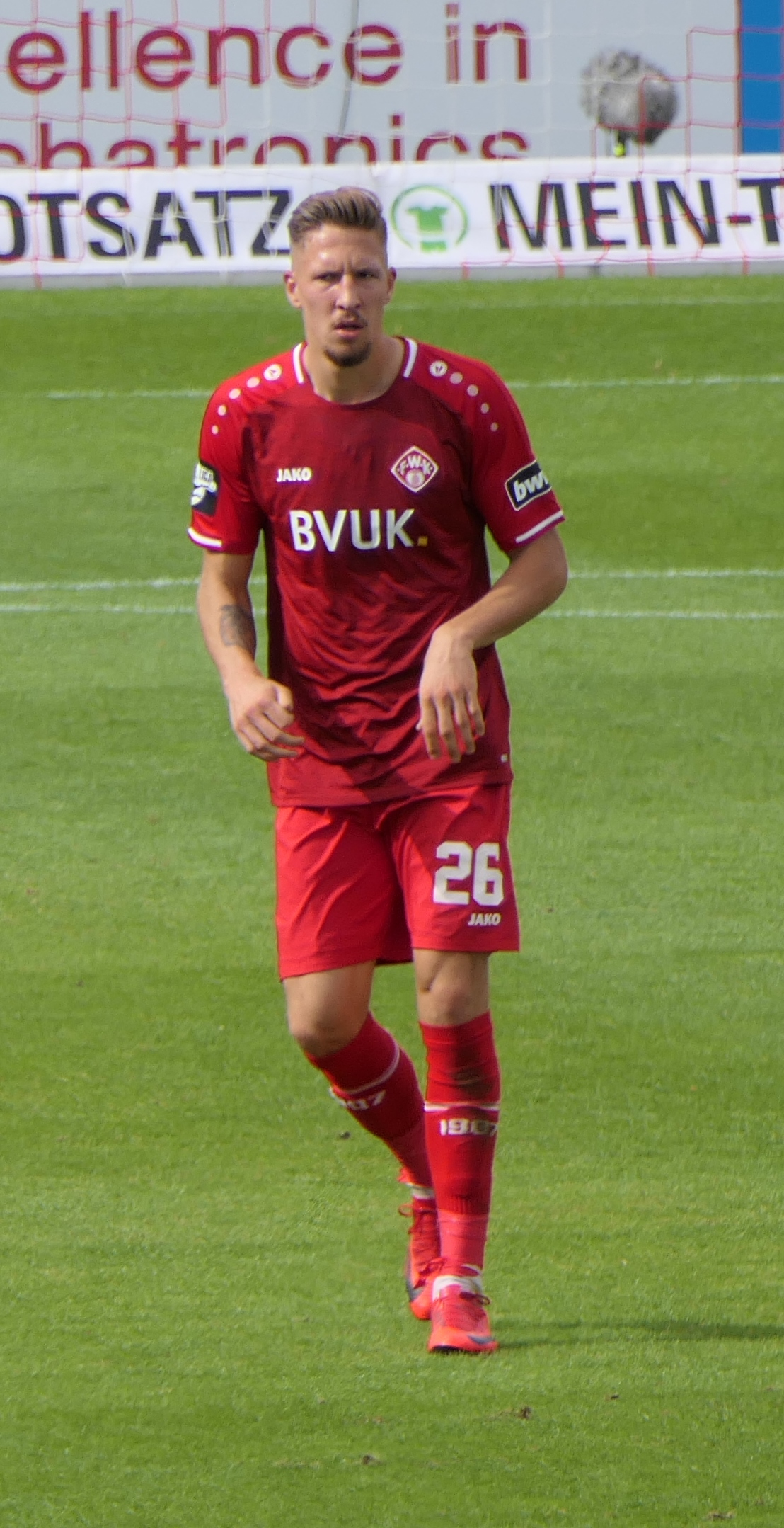 Der Fussballprofi Janik Bachmann im Trikot der Würzburger Kickers beim Heimspiel gegen Eintracht Braunschweig am 22.09.2018.